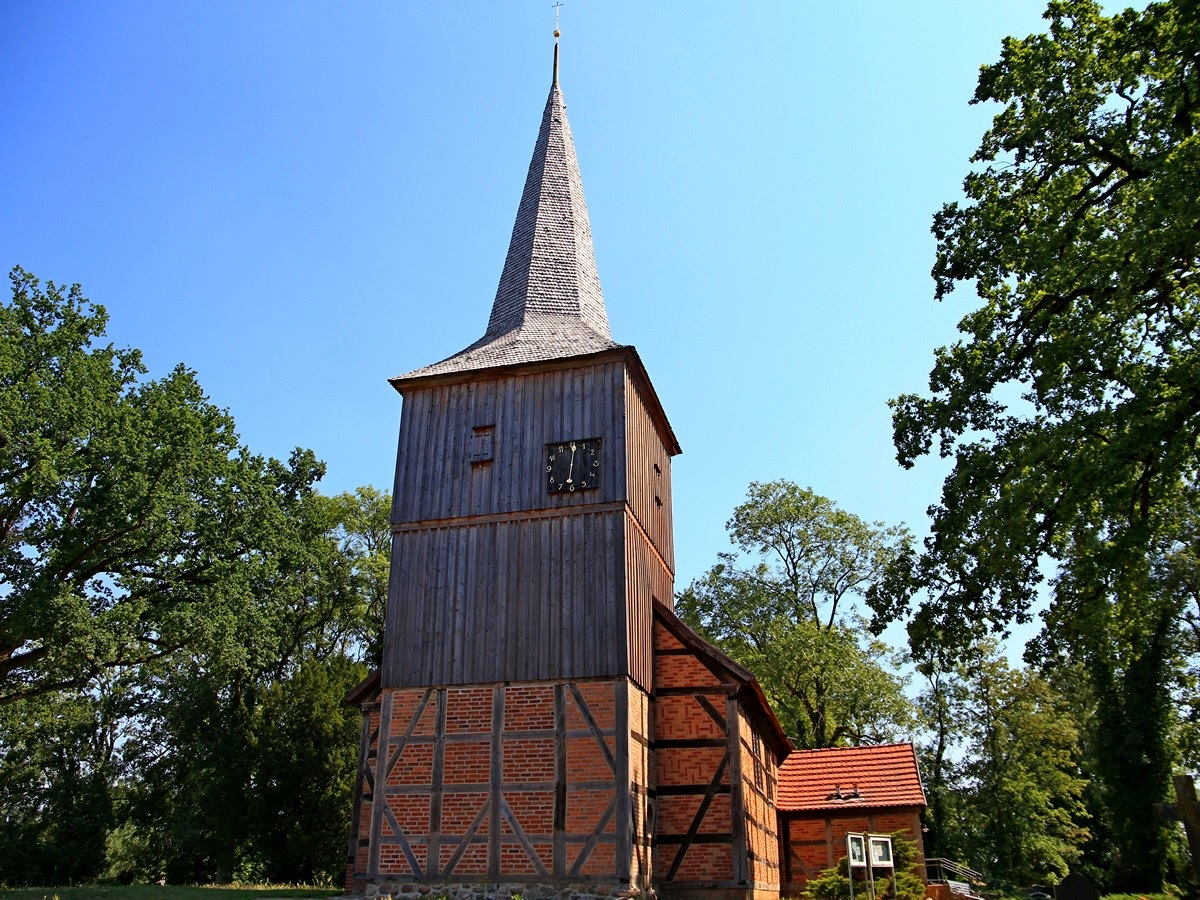 Stuersche Kirche